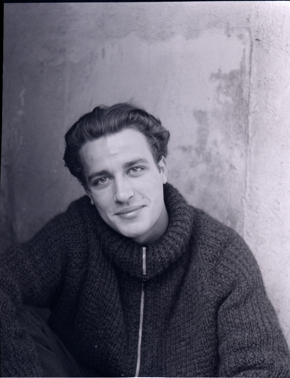 Servizio fotografico : Italia, 1982 / Paolo Monti. - Buste: 9, Fototipi: 9 : Negativo b/n, gelatina bromuro d'argento/ pellicola ; 6x6. - ((Serie costituita da 9 buste di carta, tenute insieme da una graffetta, identificate con la doppia numerazione.: R4257/ 1, R4258/ 2, R4259/ 5, R4260/ 8, R4261/ 9, R4262/ 11, R4263/ 12, R4264/ 15, R4265/ 19. - Sulla busta 4257: "Cassinelli"